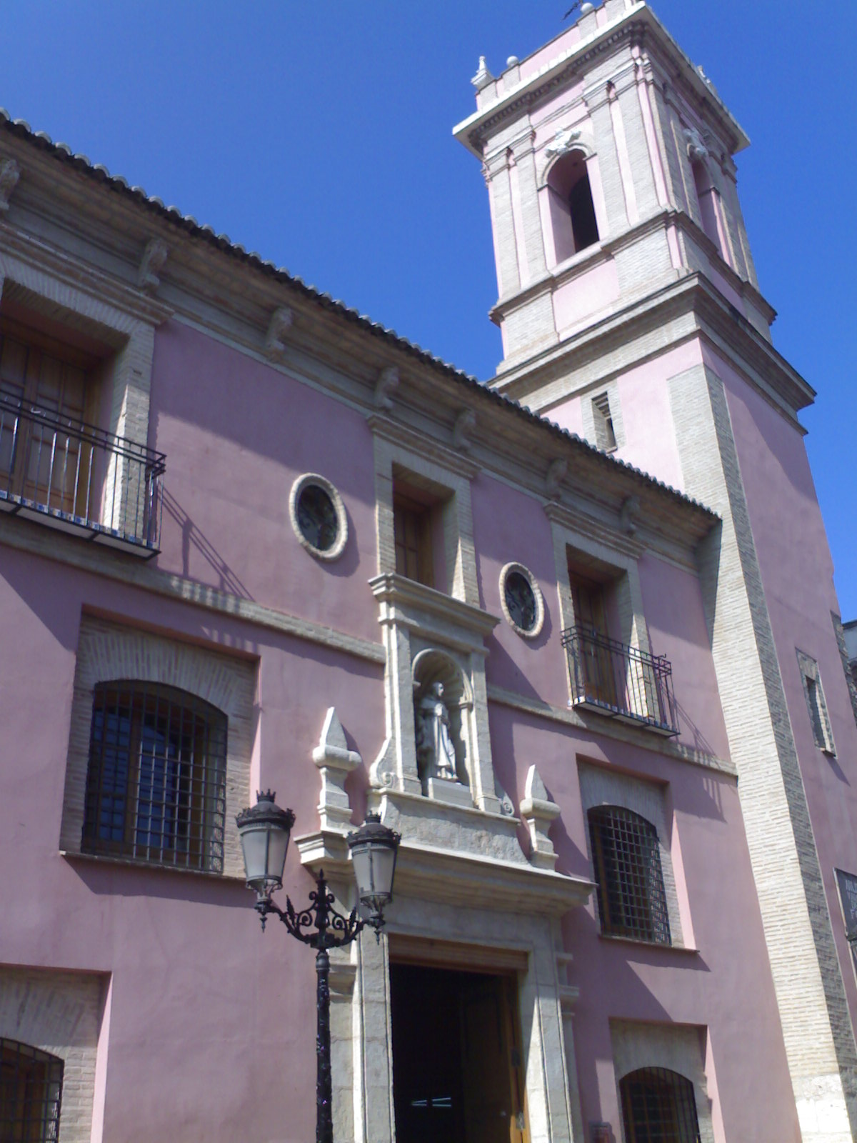 Antic convent de Sant Vicent i actual museu de la festa.